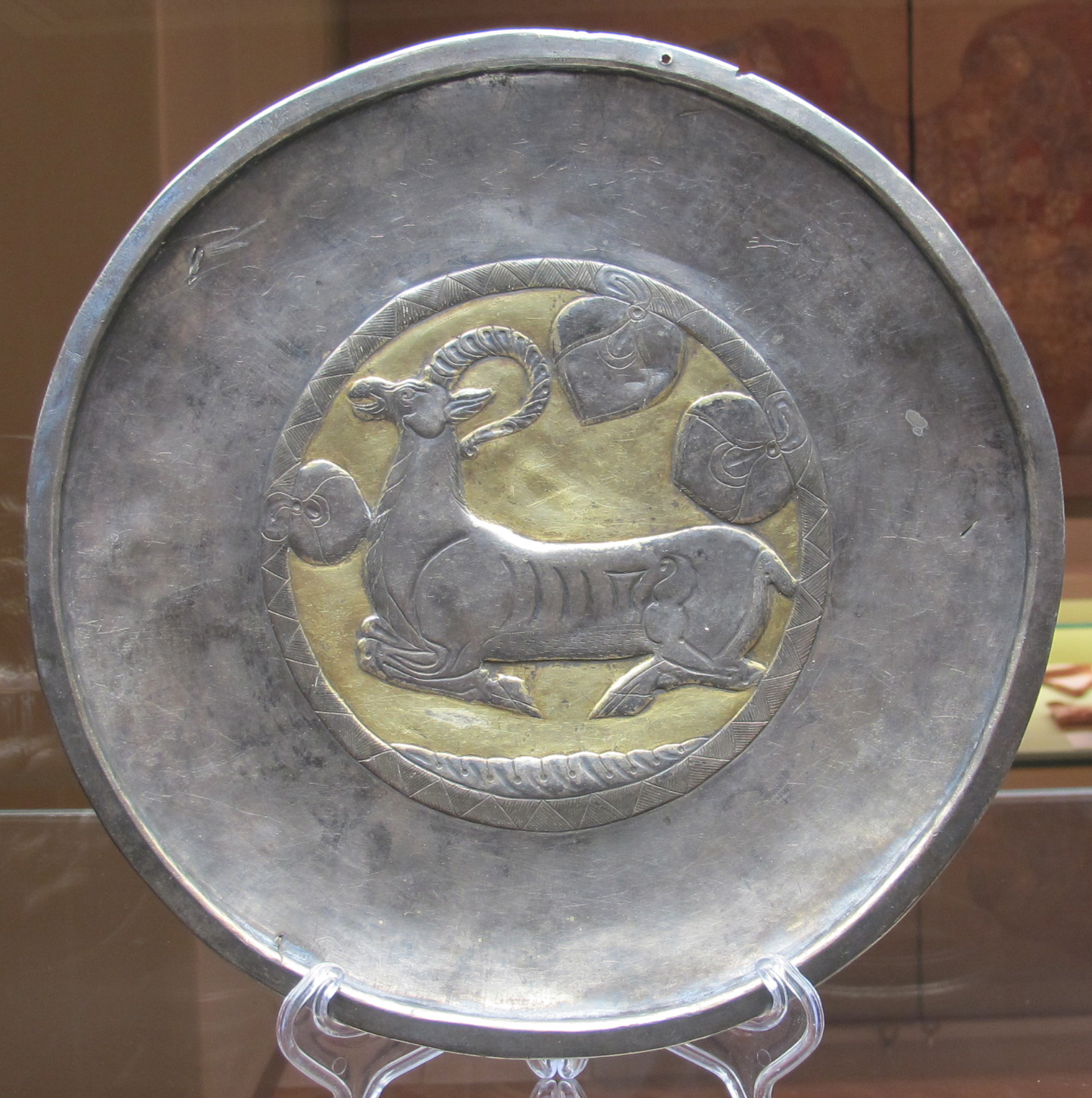 Piatto con ibis, argento, da sludka, VIII sec